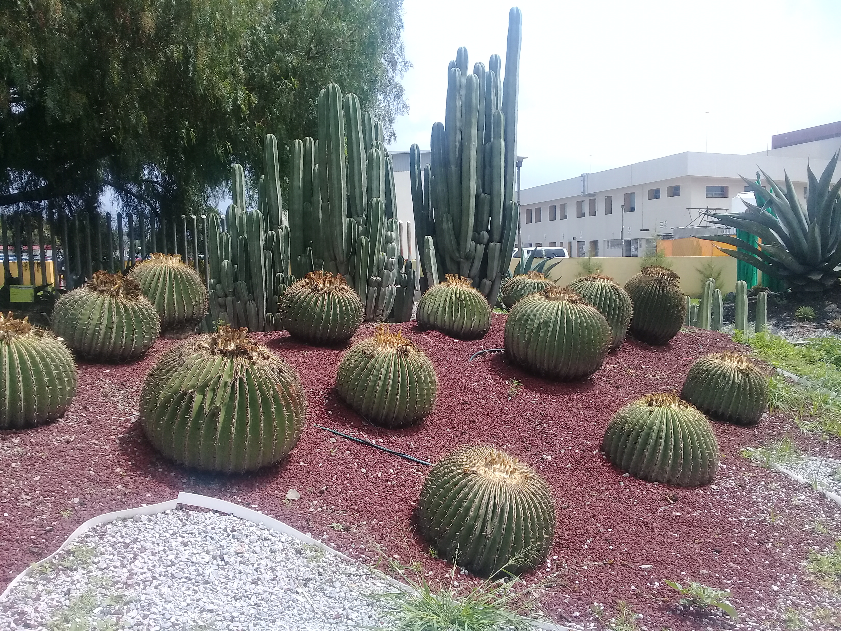 El Jardín Botánico Maximino Martínez se centra en mostrar, las cactáceas de la región y la importancia de éstas en la cultura y preservación del ecosistema, se reubica en una superficie de 550 metros cuadrados y cuenta con unas 23 especies